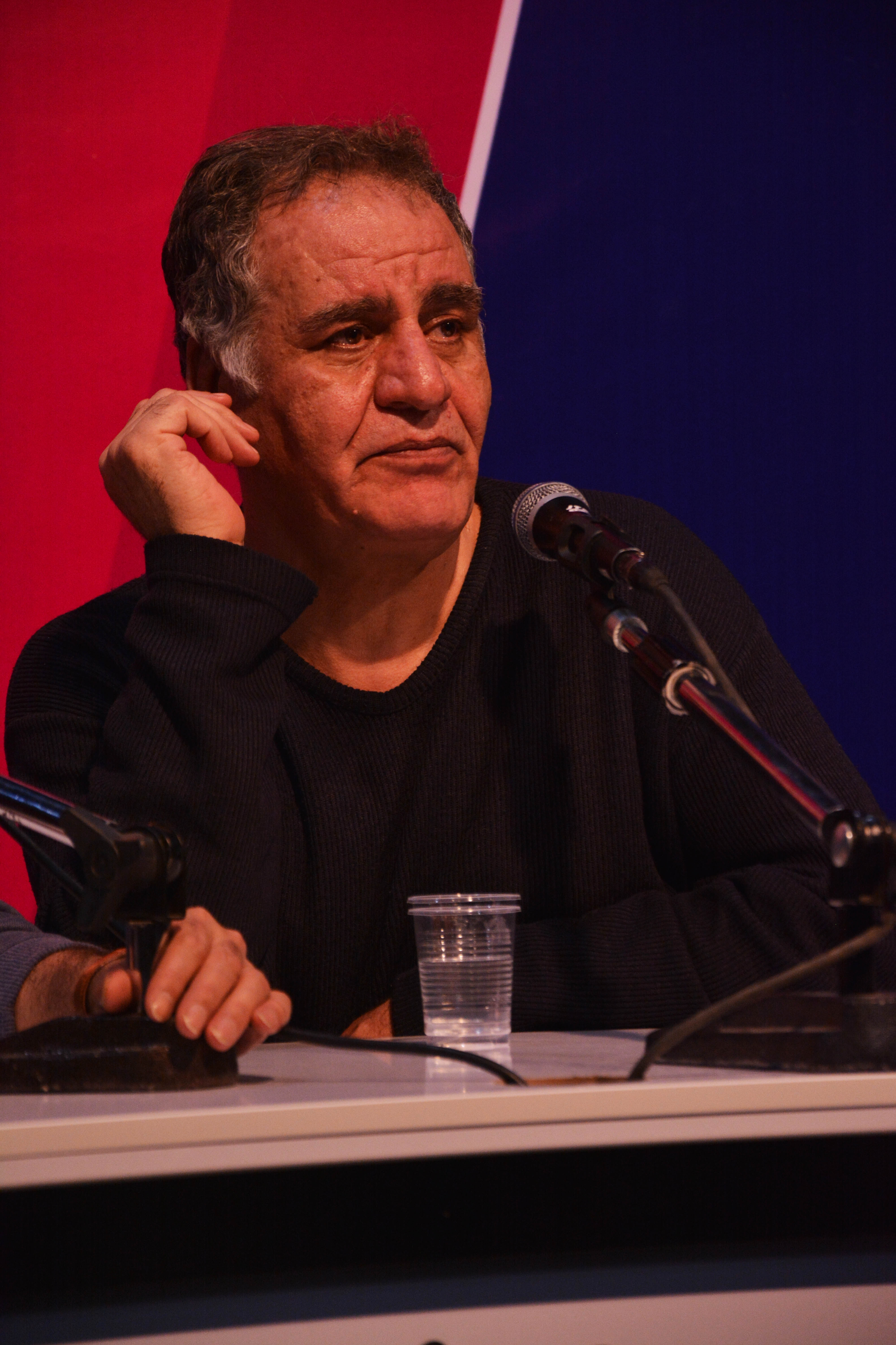 رسول صدرعاملی در پنجمین دوره جشنواره فیلم کوتاه حسنات-اسفند1394